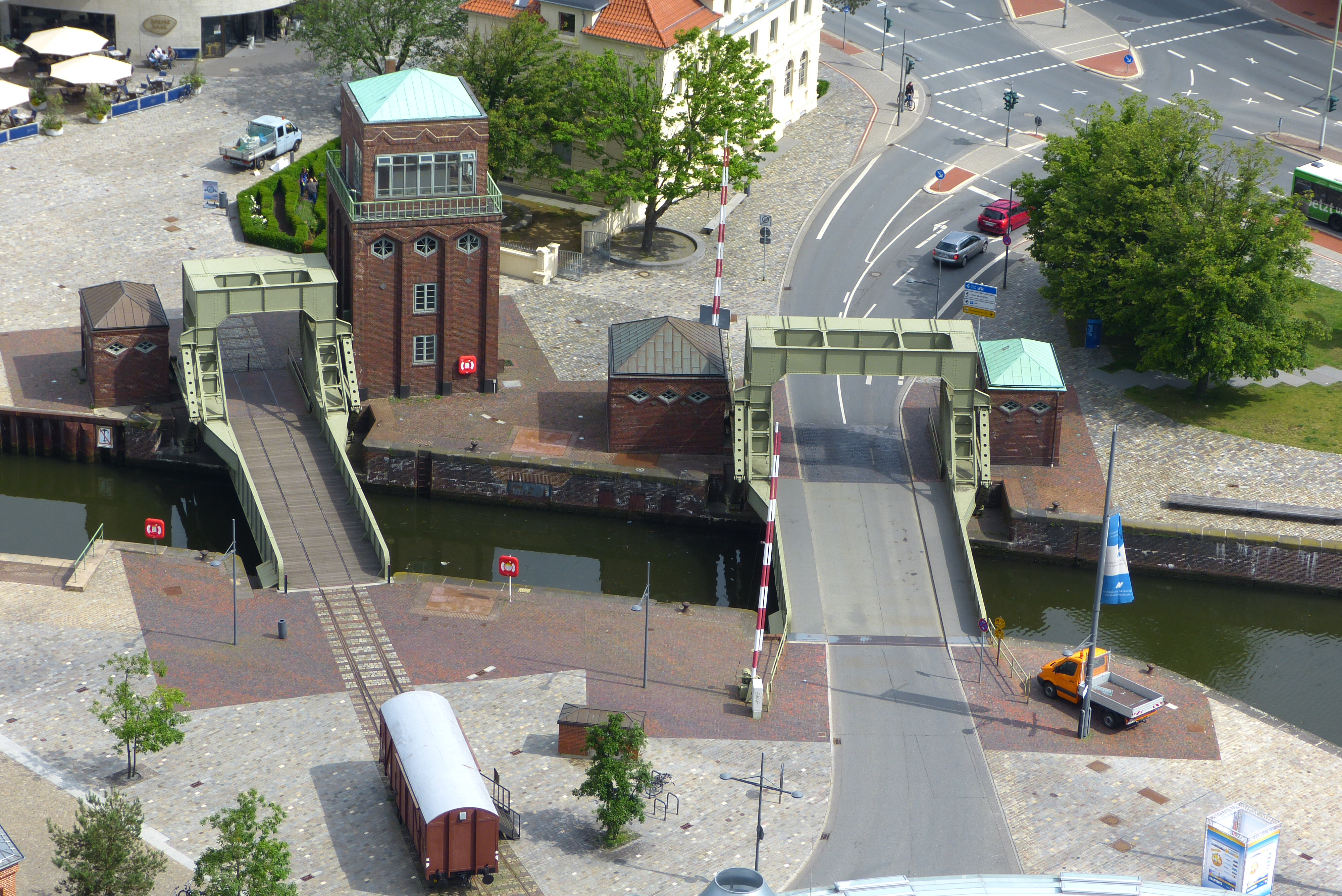 Brückenanlage zwischen Altem und Neuem Hafen in Bremerhaven, H.-H.-Meier-Straße; Gesamtansicht aus 77 m Höhe (Sail City Hotel, untere Aussichtsplattform)Die Gesamtanlage ist ein geschütztes Kulturdenkmal in der Freien Hansestadt Bremen, mit der Nr. 1543 beim Landesamt für Denkmalpflege registriert.